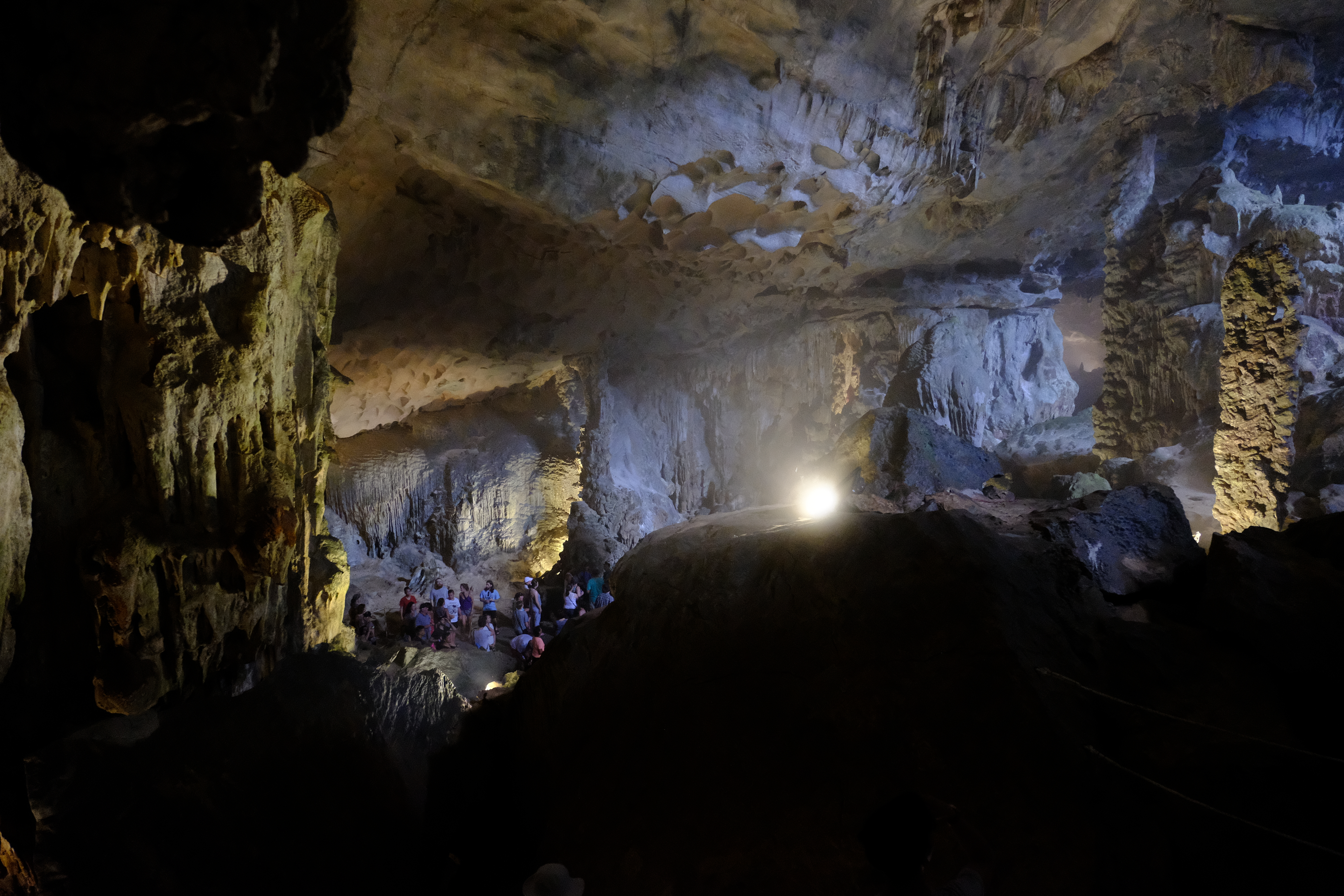 hang sửng sốt